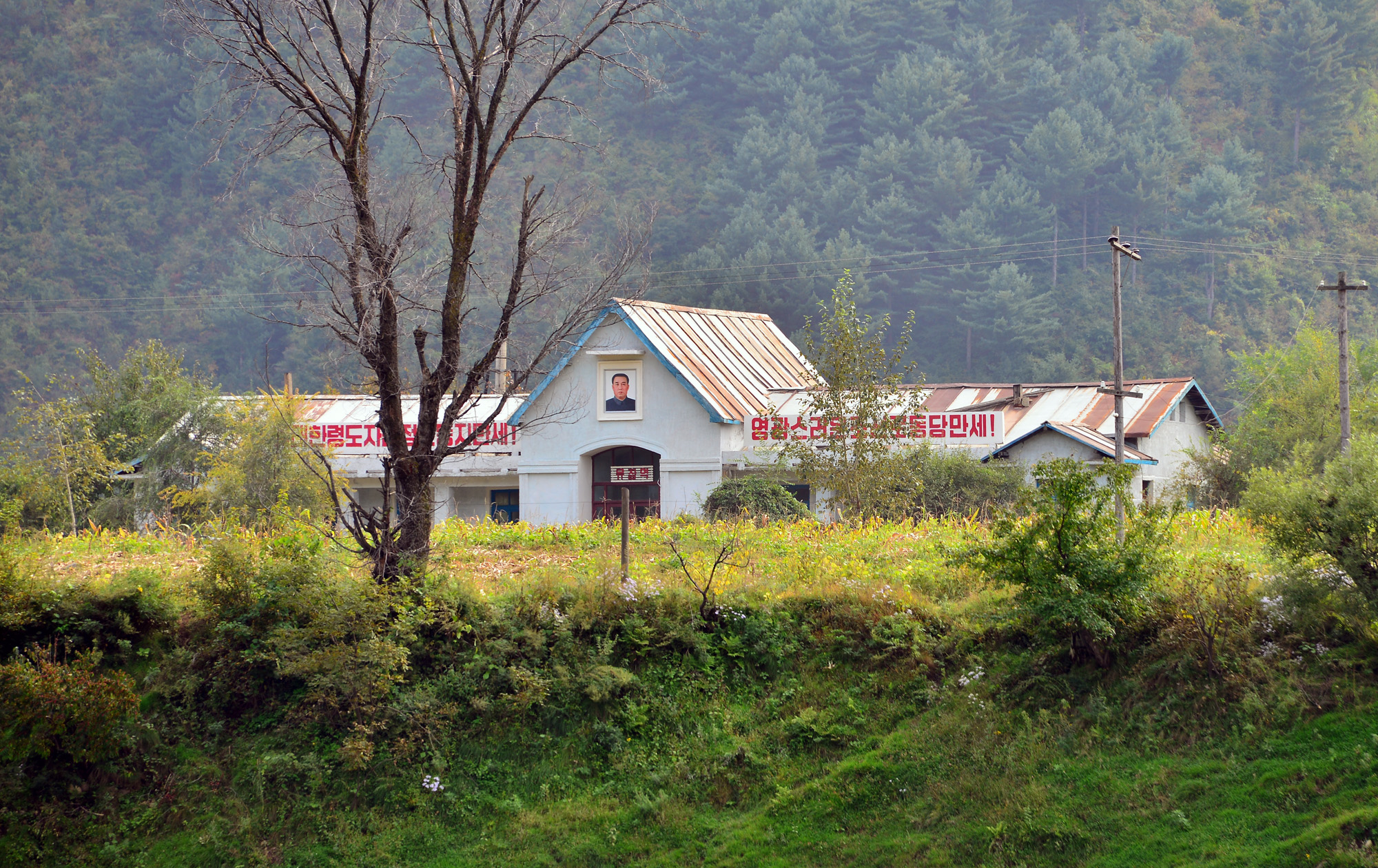 两江道茂昌站